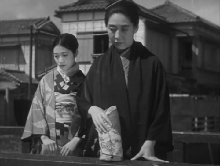 『君と別れて』、1933年